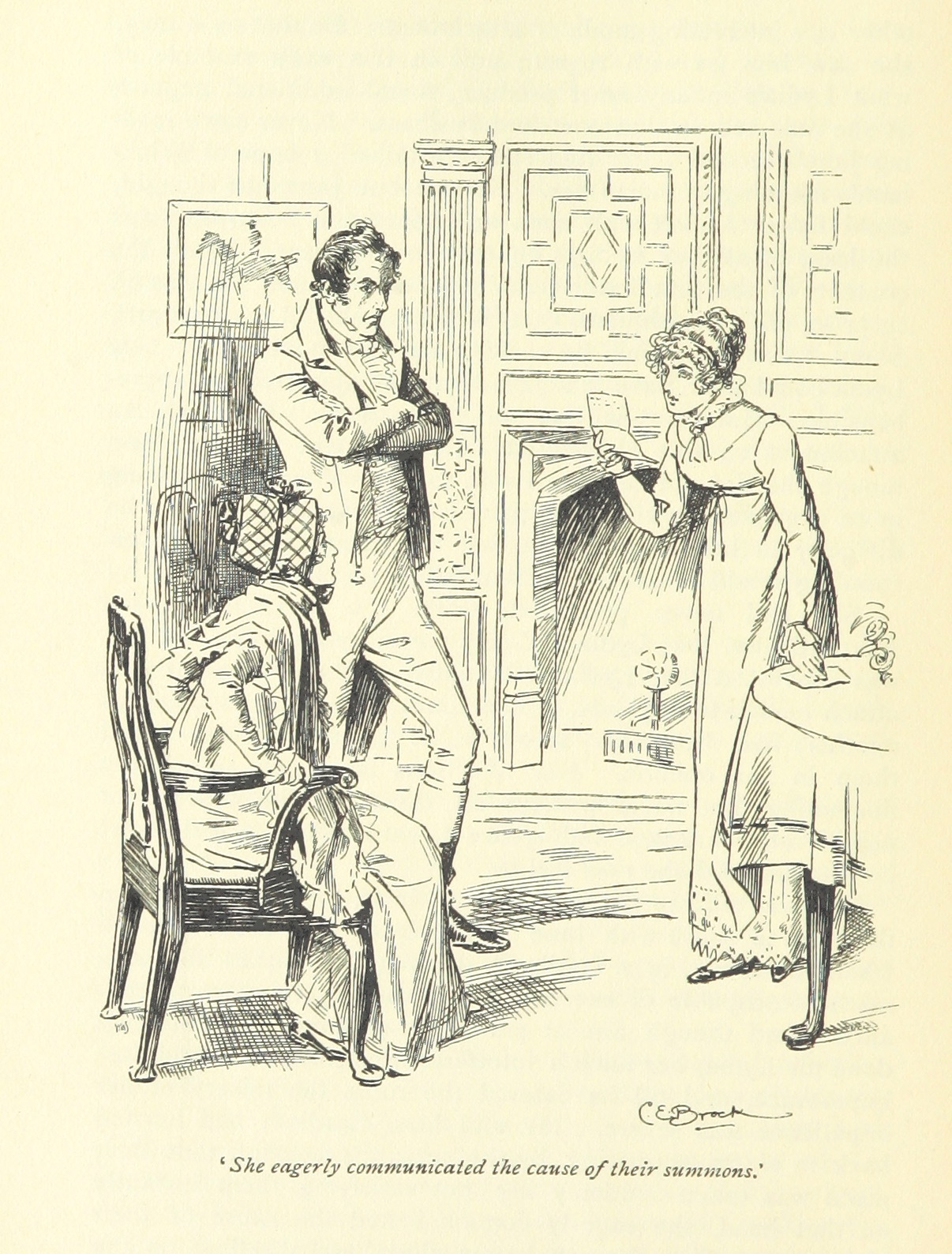 Illustration de C. E. Brock pour Pride and Prejudice (Edition MacMillan & C°, ch. 46) Elizabeth dévoile aux Gardiner l'enlèvement de Lydia par Wickham